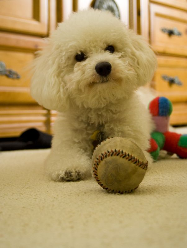 Bolognese